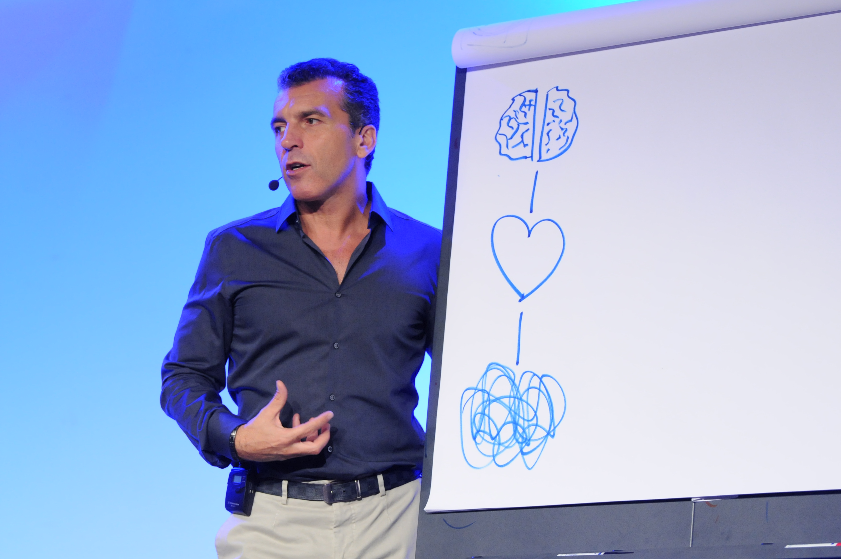 RobRe